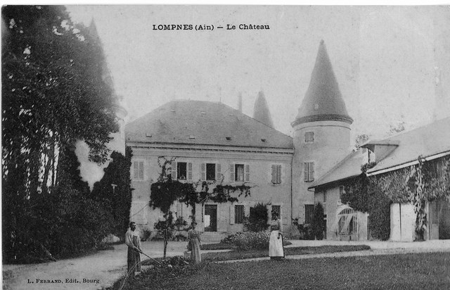 Carte postale ancienne du Château d'Angeville Hauteville-Lompnes Ain Auvergne-Rhône-Alpes